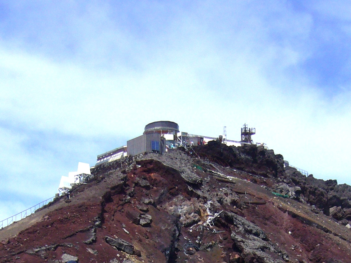 静岡県ja:富士宮市のja:富士山最高峰の剣ヶ峰頂上と、富士山測候所の現状。富士山レーダードームが撤去されたうえ、無人化されている。レーダードーム跡のすぐ右側のオレンジ色の服を着た人のすぐ右が、三角点の置かれた最高地点。ja:2007年8月27日に投稿者が撮影。